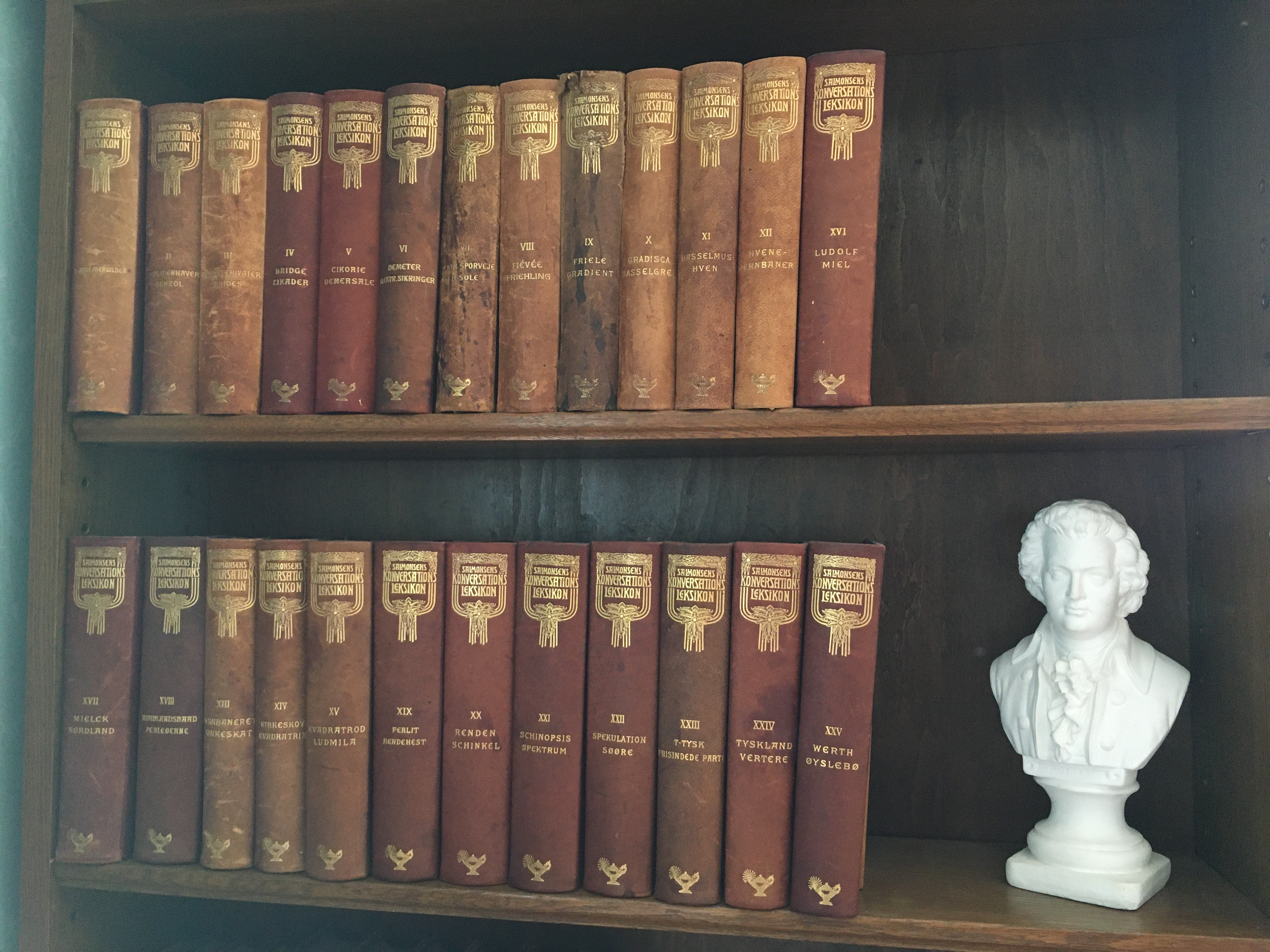 Salmonsens Konversationsleksikon